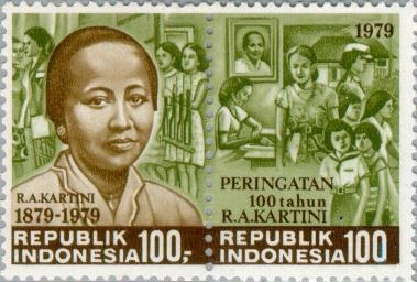 Kartini